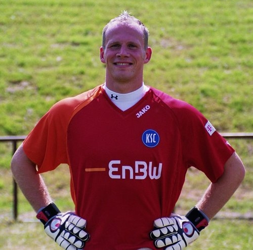 Markus Miller